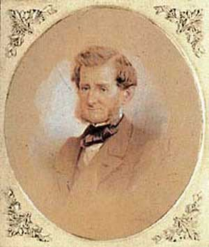 Портрет русского архитектора Андрея Ивановича Штакеншнейдера (1802—1865) работы Ивана Андреевича Гоха.